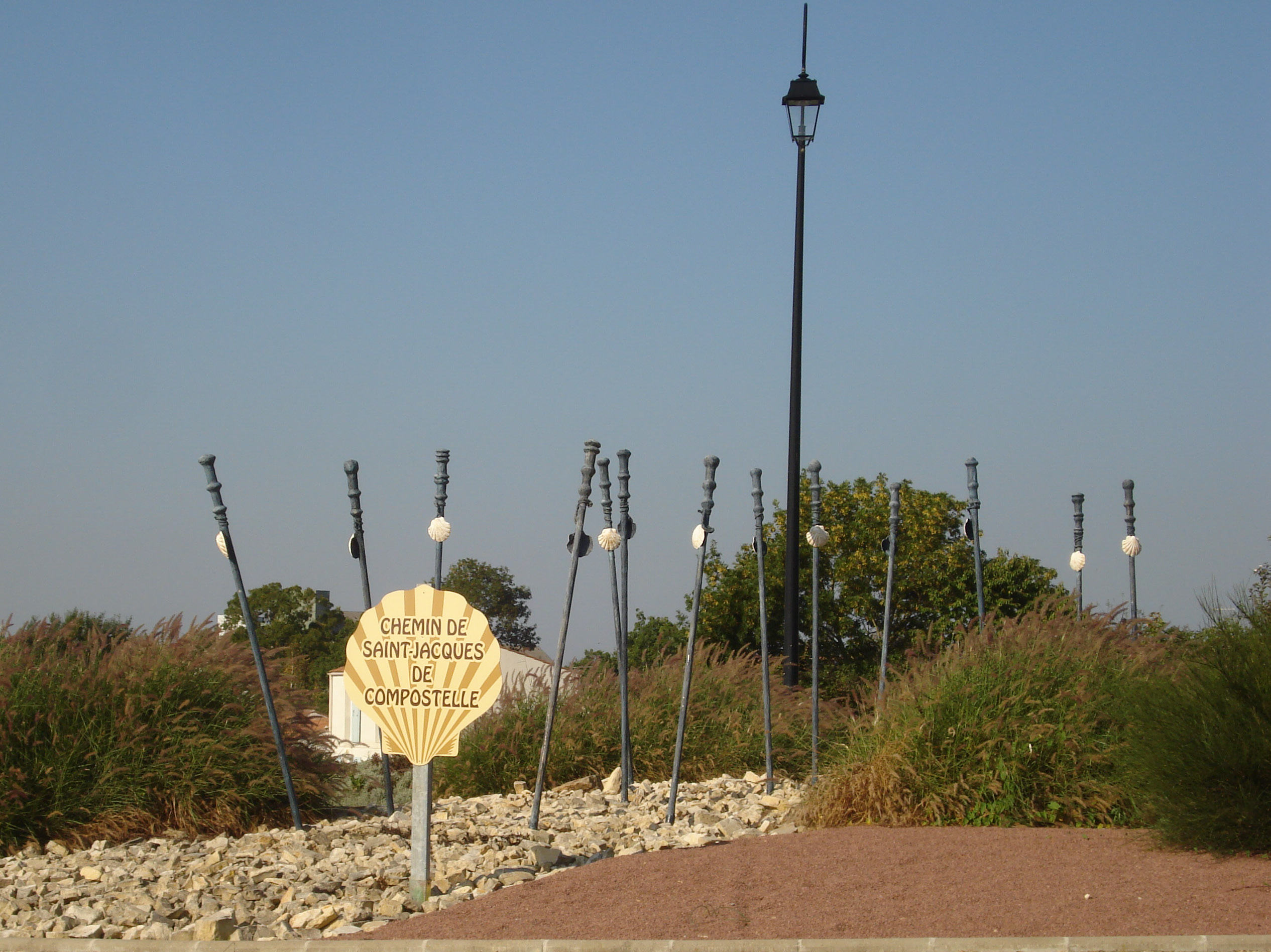 Rond-point d'aulnay sur la route de Néré